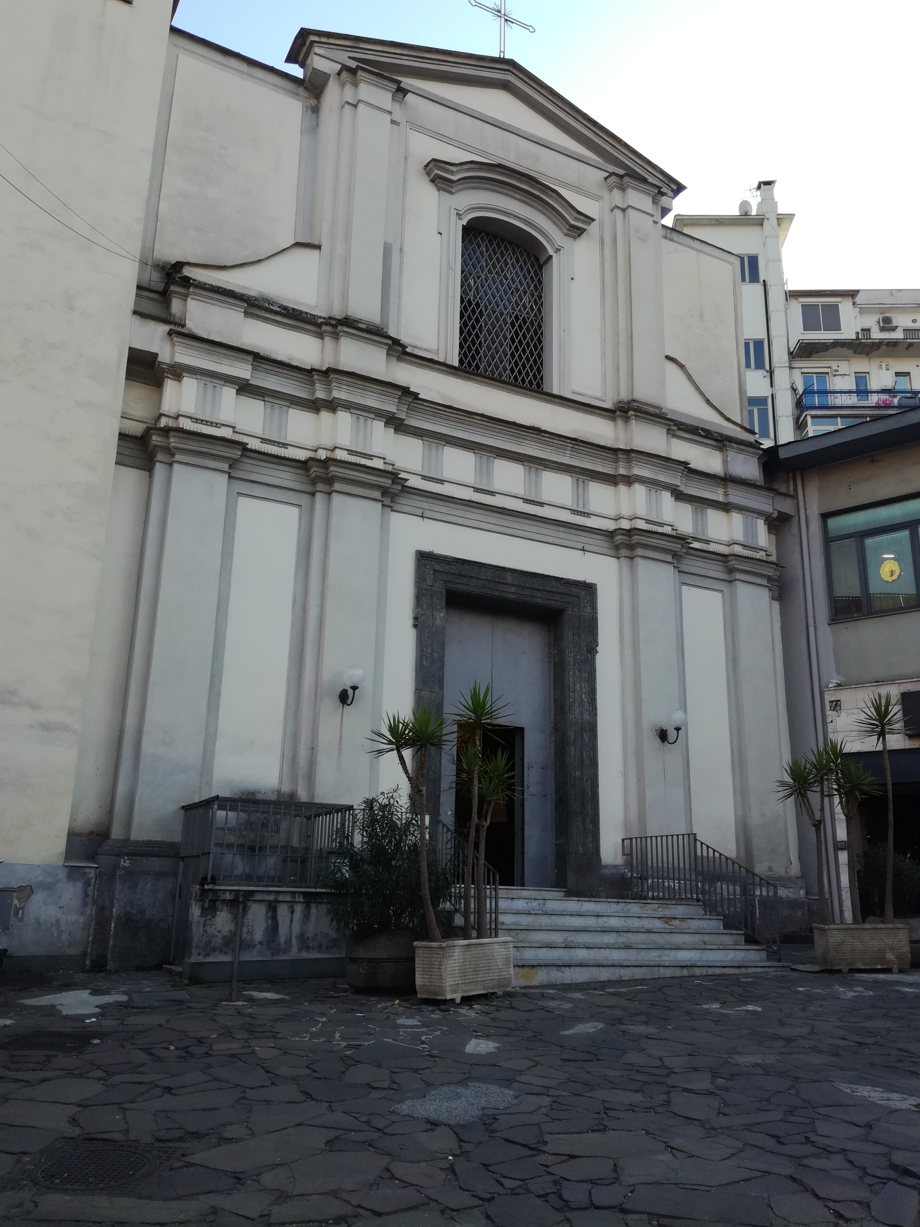 Chiesa dell'Arciconfraternita di Santa Maria del Soccorso all'Arenella (Napoli)